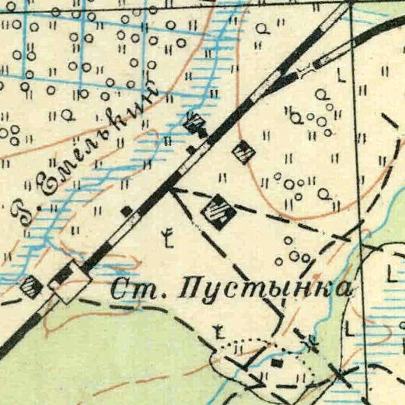 Топографическая карта Ленинградской области, квадрат О-36-14-В-а (п. Ульяновка), посёлок Пустынка.